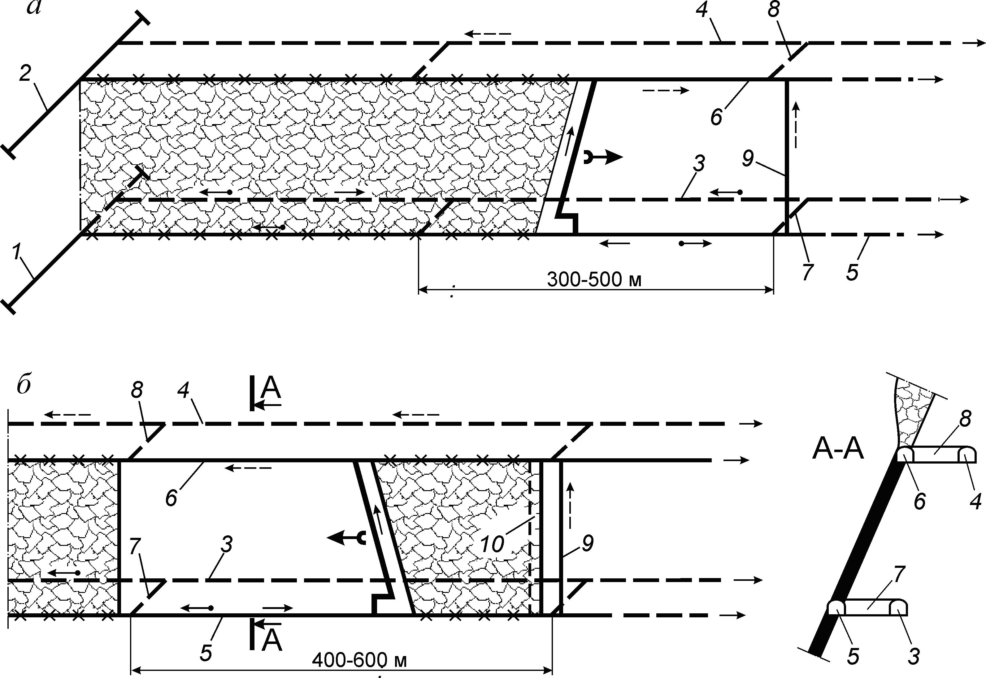 Схема